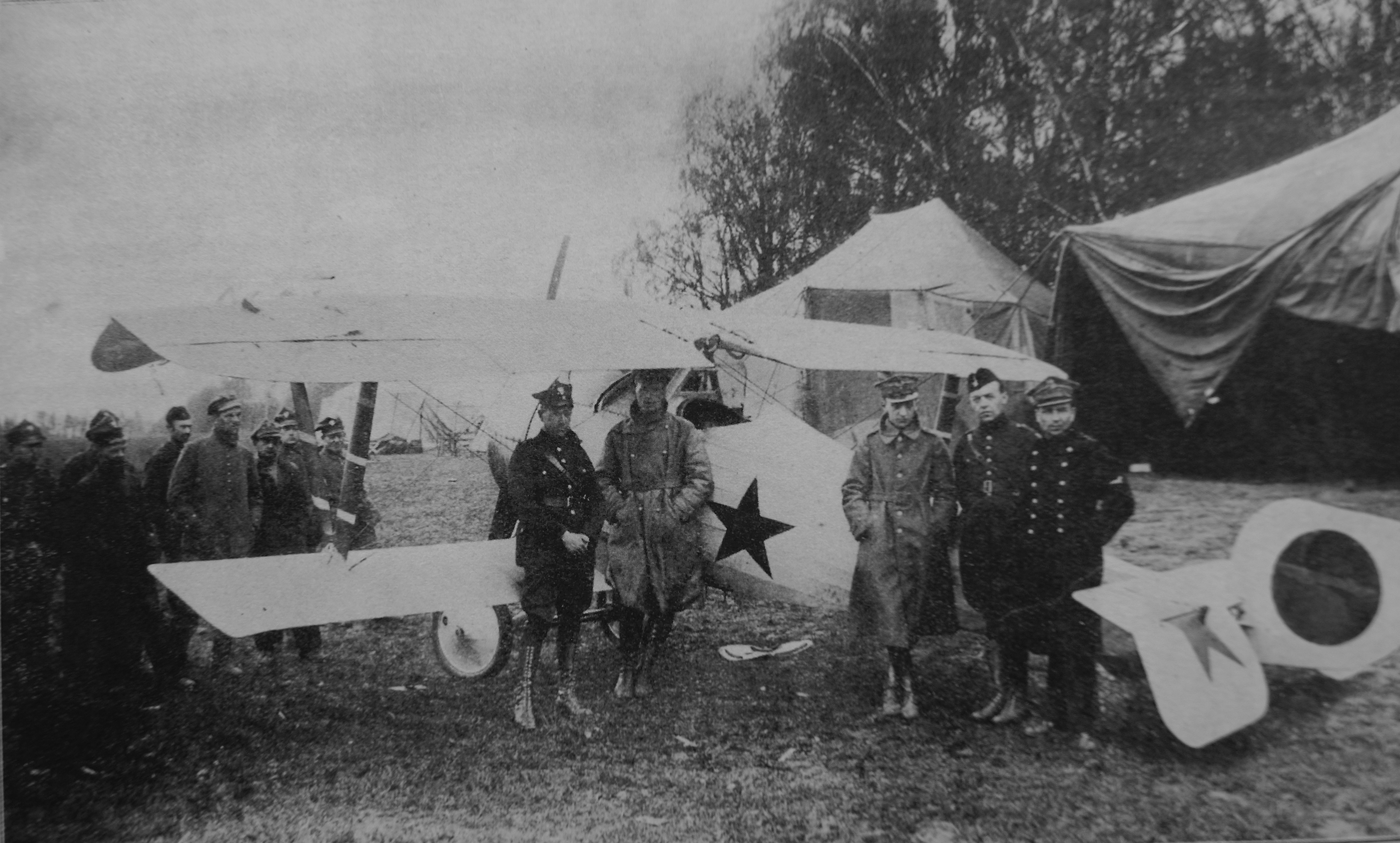 Przylot ppłk Piotra Abakanowicza na lotnisko 14-ej eskadry w Żodzinie 1 maja 1920. Stoją: ppor. Józef Mańczak, Piotr Abakanowicz, ppor. Henryk Liebek, ppor. Mieczysław Konarski, kpt. Wacław Iwaszkiewicz